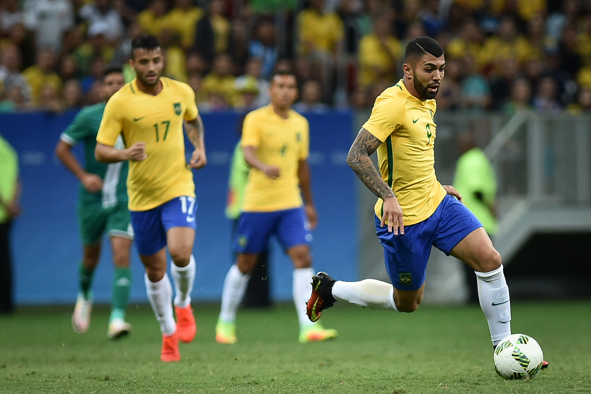 Estádio Nacional de Brasília Mané Garrincha, Brasília, DF, Brasil, 7/8/2016 Foto: Andre Borges/Agência Brasília. Brasil e Iraque jogam neste domingo (7), no Estádio Mané Garrincha, pelo grupo A do futebol masculino nas Olimpíadas 2016.